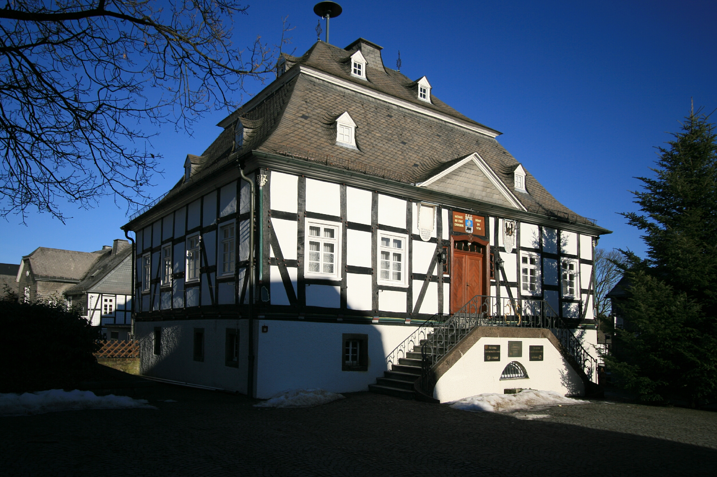 Alte Rathaus der Stadt Eversberg